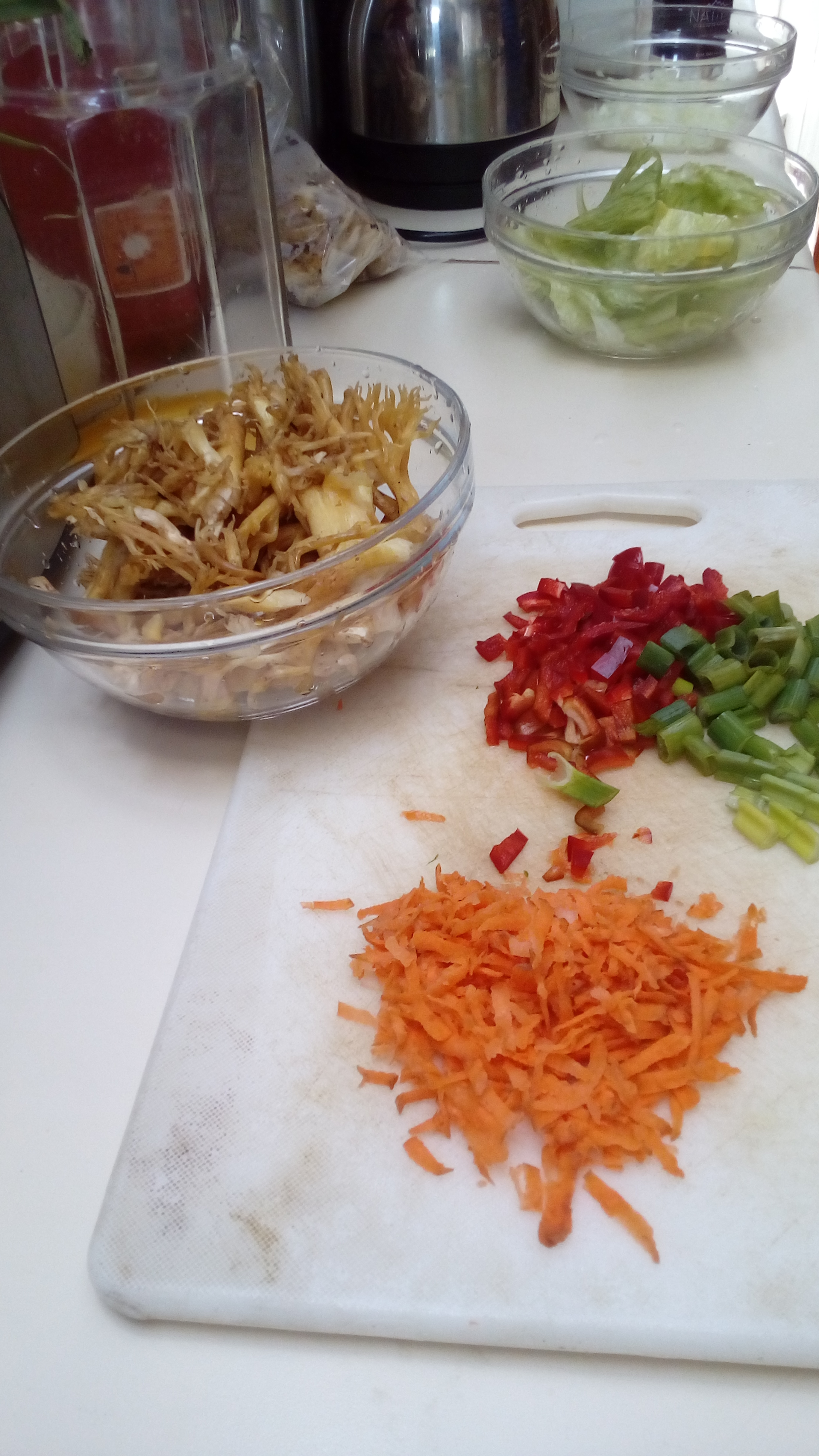 Changle, zanahoria, cebollín, apio, lechuga y cebollas.